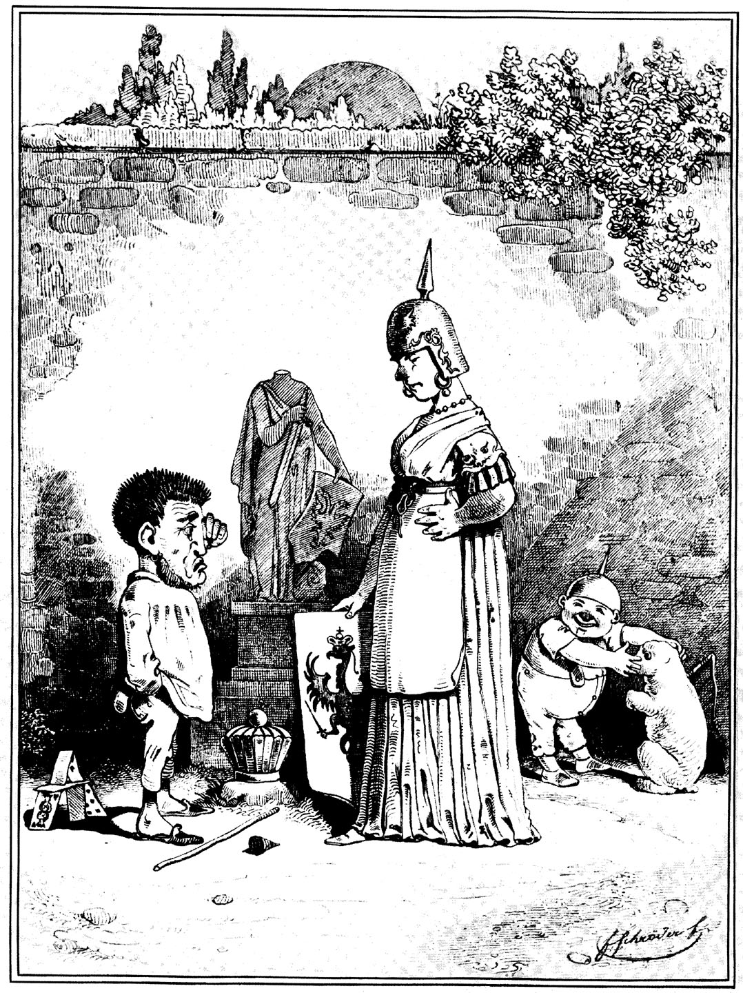 Karikatur zum Scheitern der kleindeutschen Lösung (Friedrich Wilhelm IV. [1795–1861] lehnt die Krone des Deutschen Reichs ab.) rsp. auf den Parlamentspräsidenten sowie Reichsverweser Heinrich Wilhelm August Freiherr von Gagern (1799–1880) nach der Ablehnung der Kaiserkrone durch Friedrich Wilhelm IV.„Wat heulst’n kleener Hampelmann?“ – „Ick habe Ihr’n Kleenen ’ne Krone jeschnitzt, nu will er se nich!“ (Titel in rsp. auf Berlinerisch bzw. in einem oder im berliner’schen Dialekt)Zuerst erschienen in: Düsseldorfer Monatshefte. 1849, unter dem Titel: Rundgemälde von Europa im August MDCCCXLIX (1849)Lithografie Ferdinand Schröders (1818–1857)